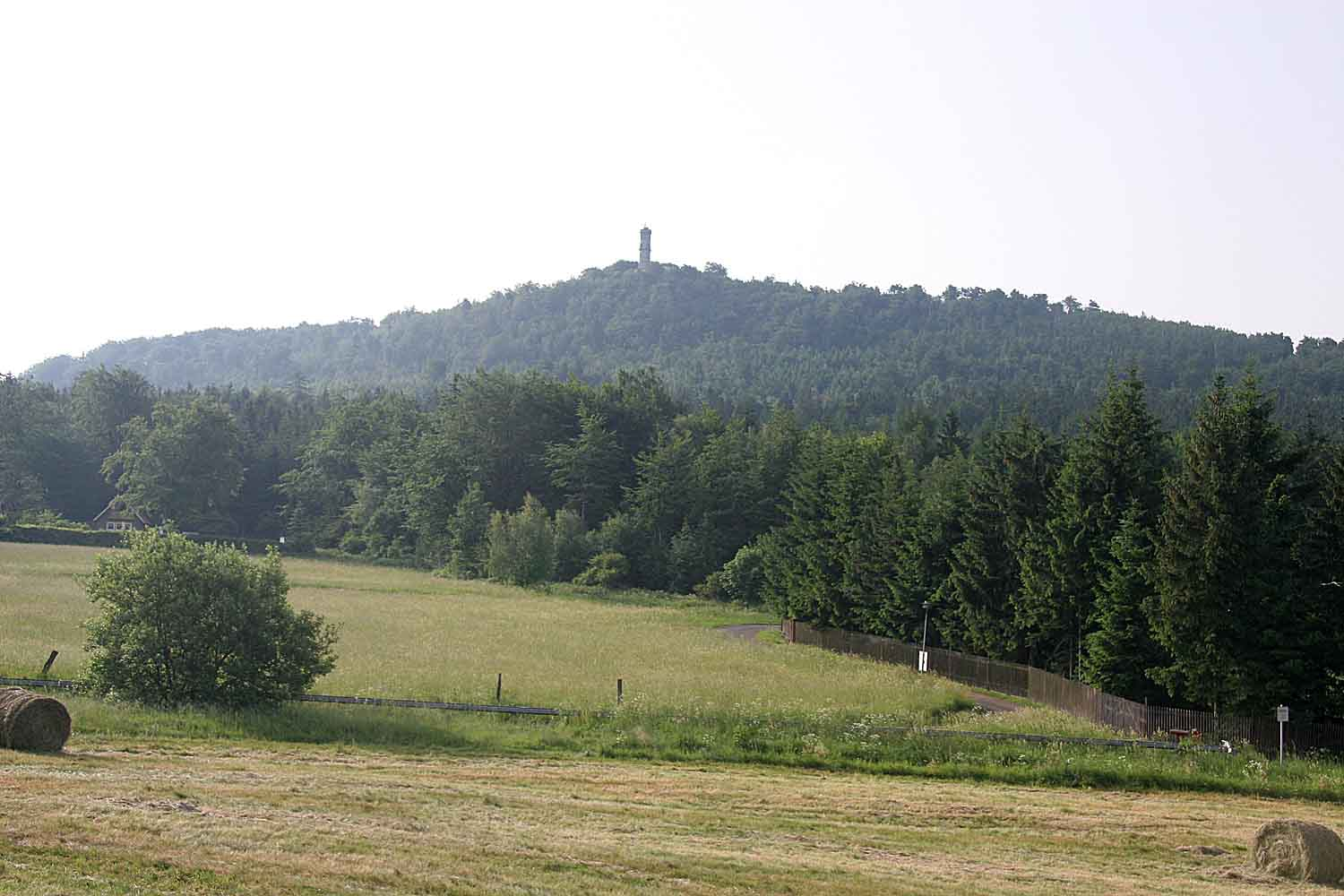 Vrchol hory Hvozd v Lužických horách s cesty k hraničnímu přechodu Jánské kameny